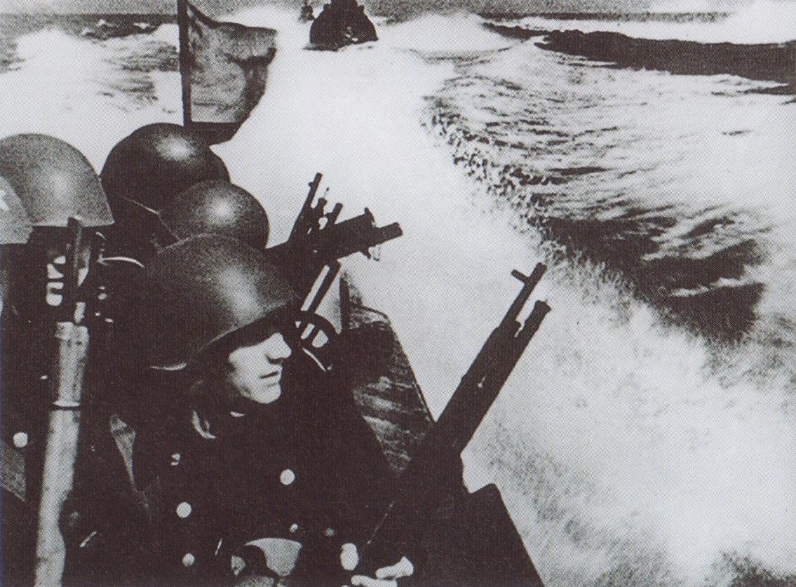 Venäläinen iskujoukko matkalla Hangon tutkikohdasta Bengtskäriin.